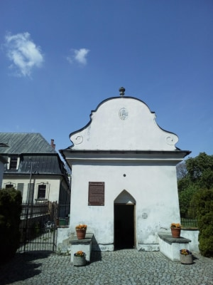 Replika grobu pańskiego